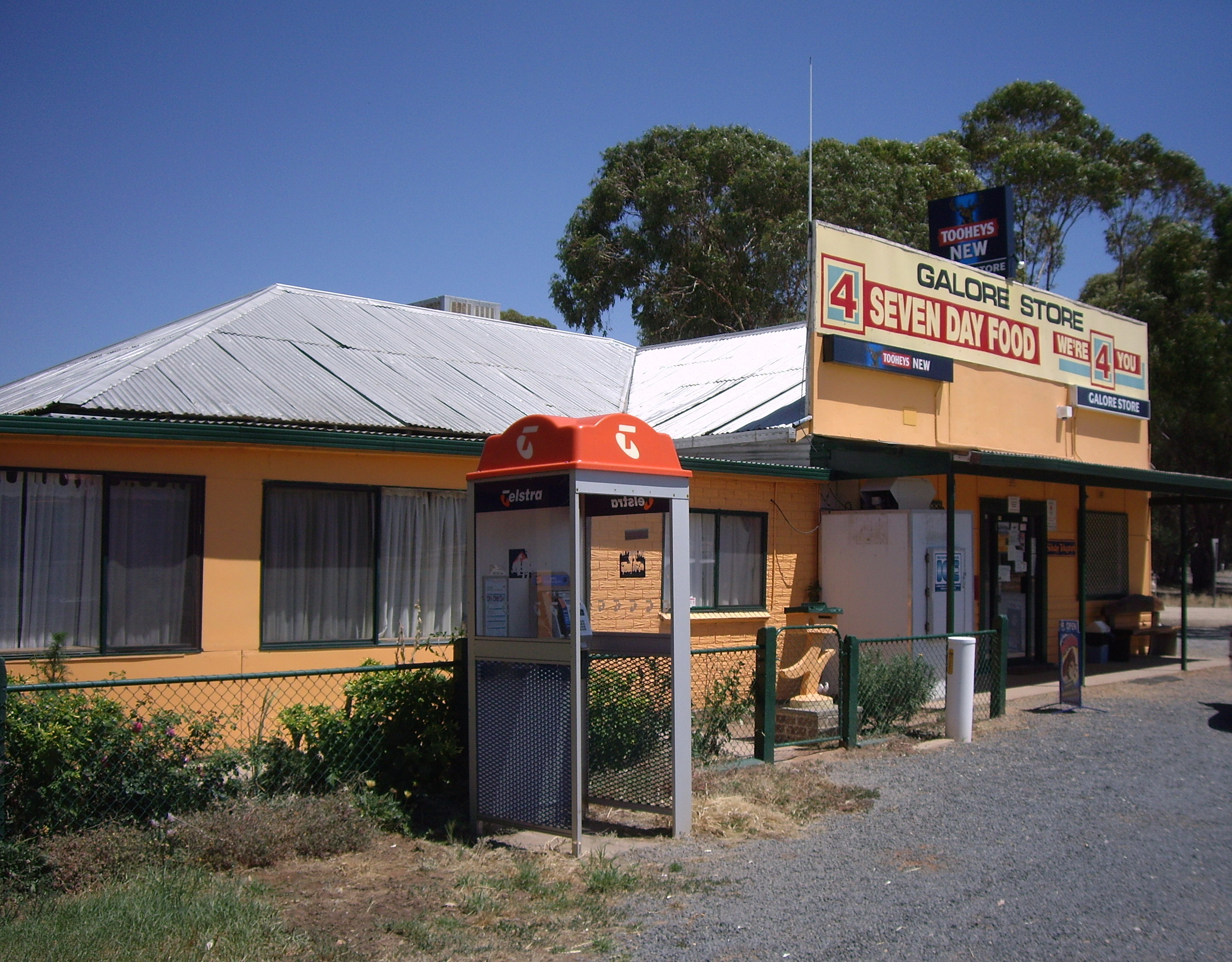 Galore General Store